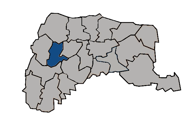 台灣省雲林縣東勢鄉 KaurJmeb於2005年1月28日為編輯zh:東勢鄉所繪製